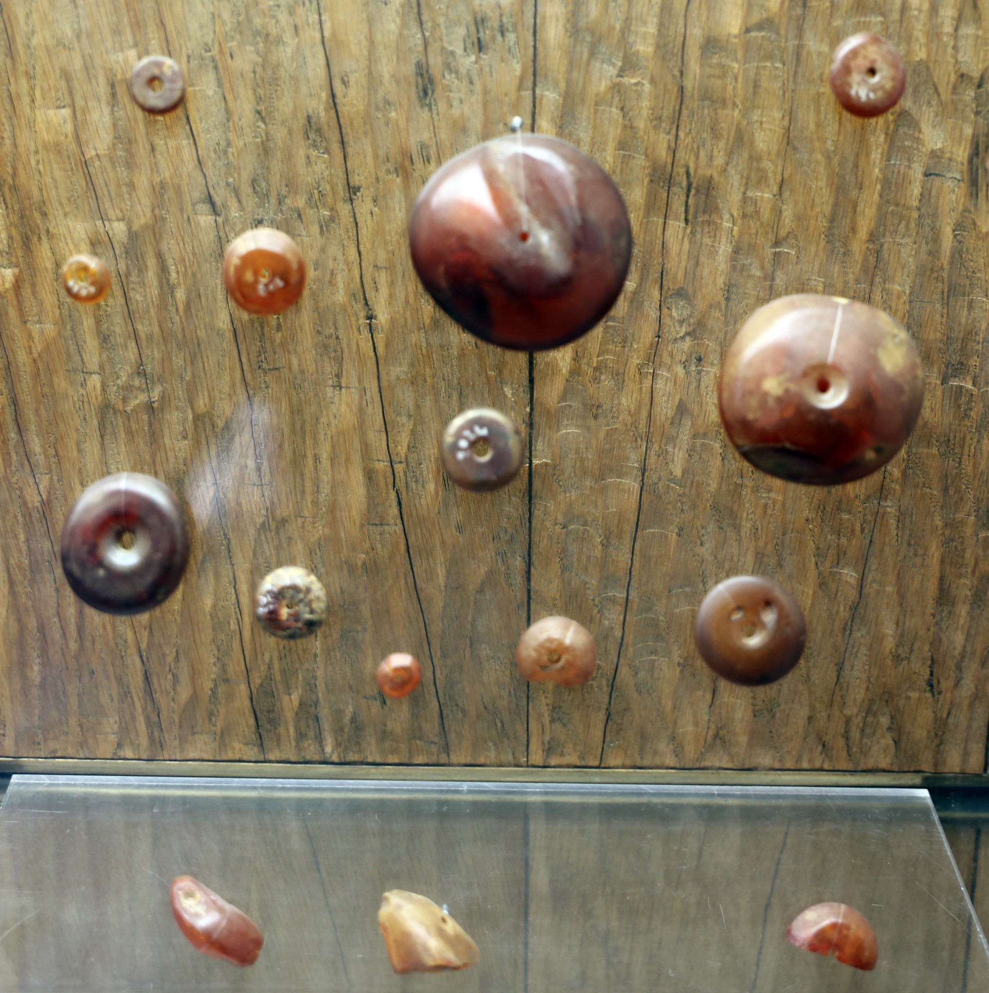 Museo archeologico nazionale (Parma) This is a photo of a monument which is part of cultural heritage of Italy.